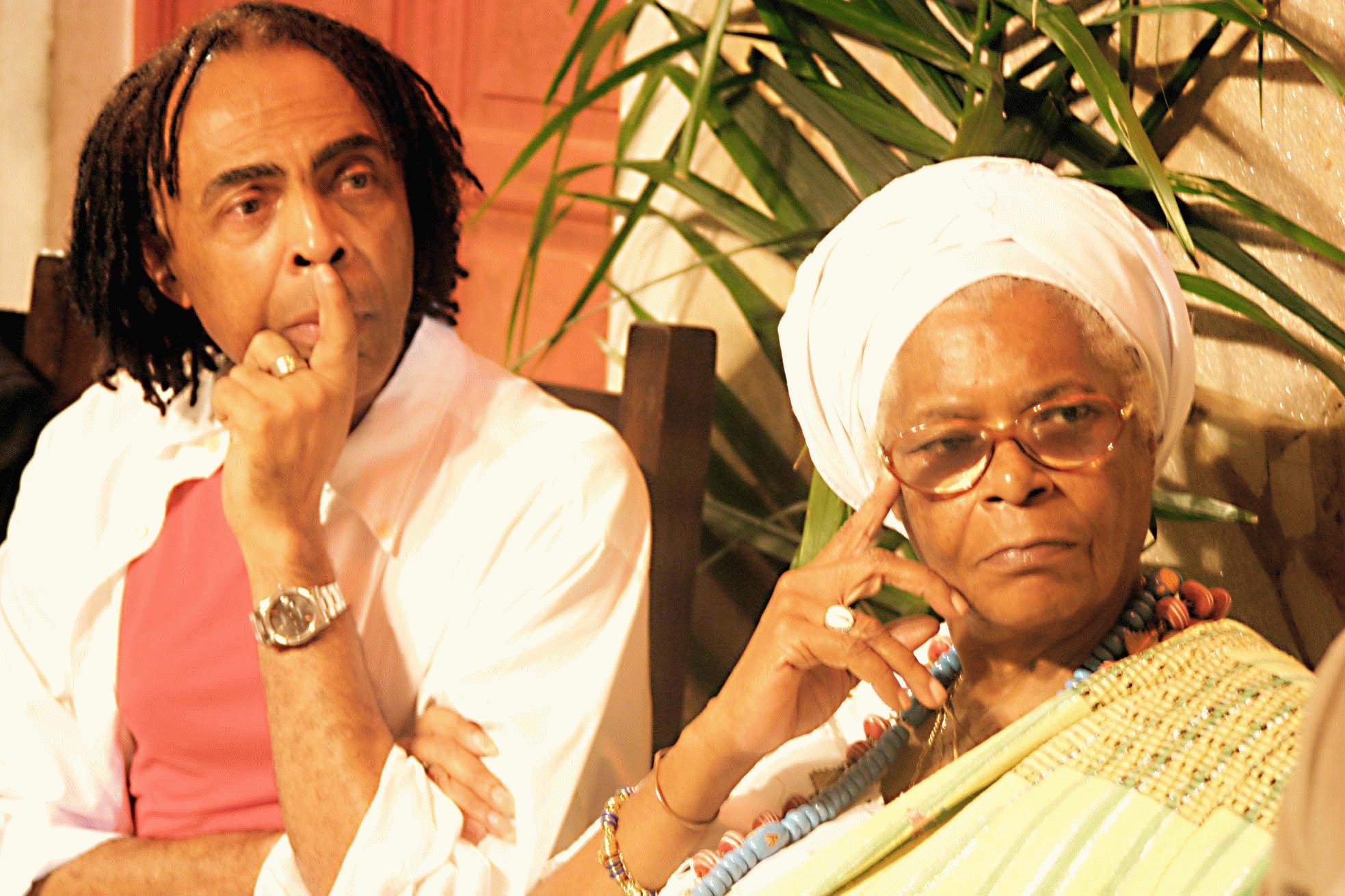 Ministro Gilberto Gil e Mãe Stella de Oxossi do Terreiro Ilê Axé Opô Afonjá em Salvador, Bahia